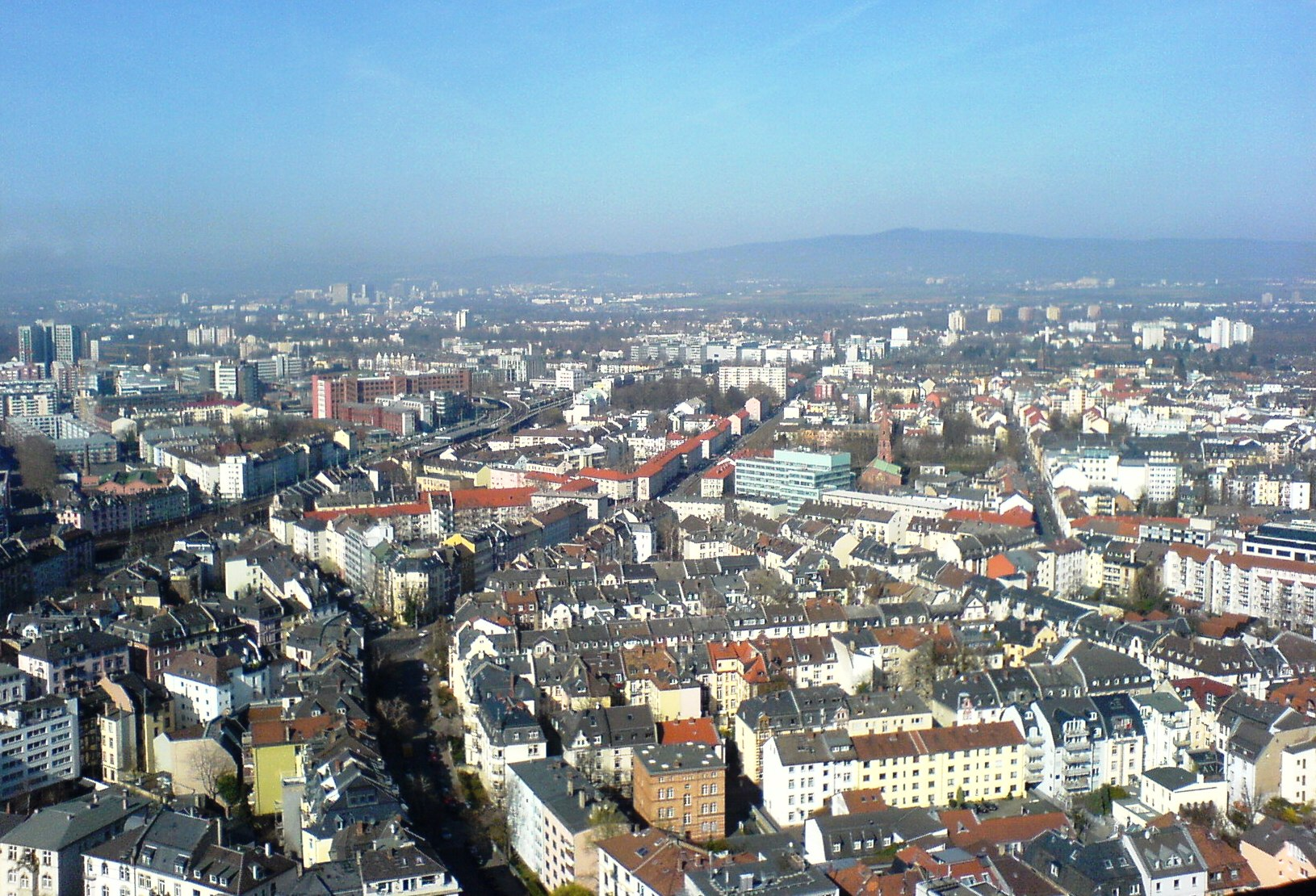 Frankfurt-Bockenheim (im Vordergrund), fotografiert vom AfE-Turm der Johann Wolfgang Goethe-Universität in Frankfurt mit Blick nach Nord-Westen. Etwa in der Bildmitte die Kreuzung Adalbert- und Schlossstraße. Rechts danebn, das hellblaue Gebäude ist das jetzige (2019) Studentenwohnheim in der Adalbertstr. 48. Dahinter der Kurfürstenplatz.